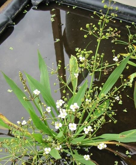 Lanzettblättriger Froschlöffel